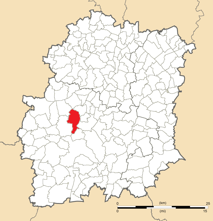 Carte de position de Villeconin en Essonne (91)